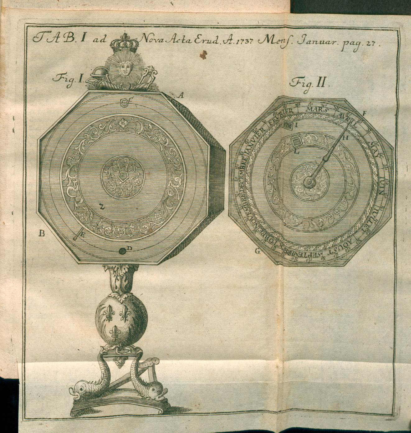 Illustration